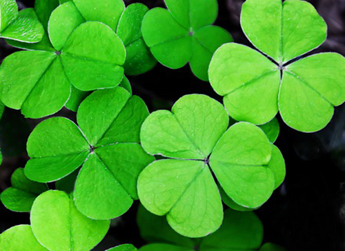 tumbuhan semanggi